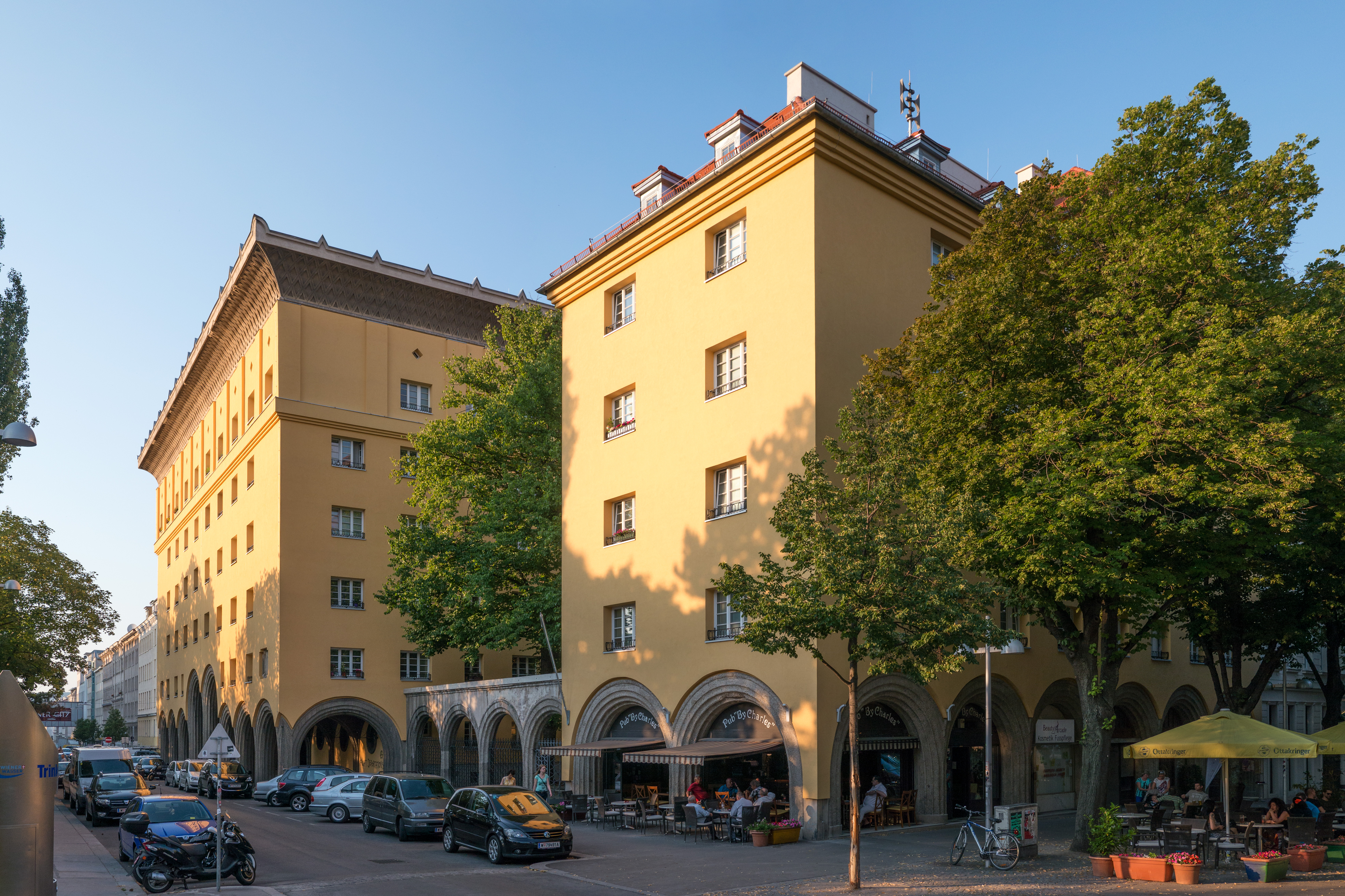 Kommunaler Wohnbau, Vogelweidhof, sogenannter Märchenhof; Nach Sanierung 2014